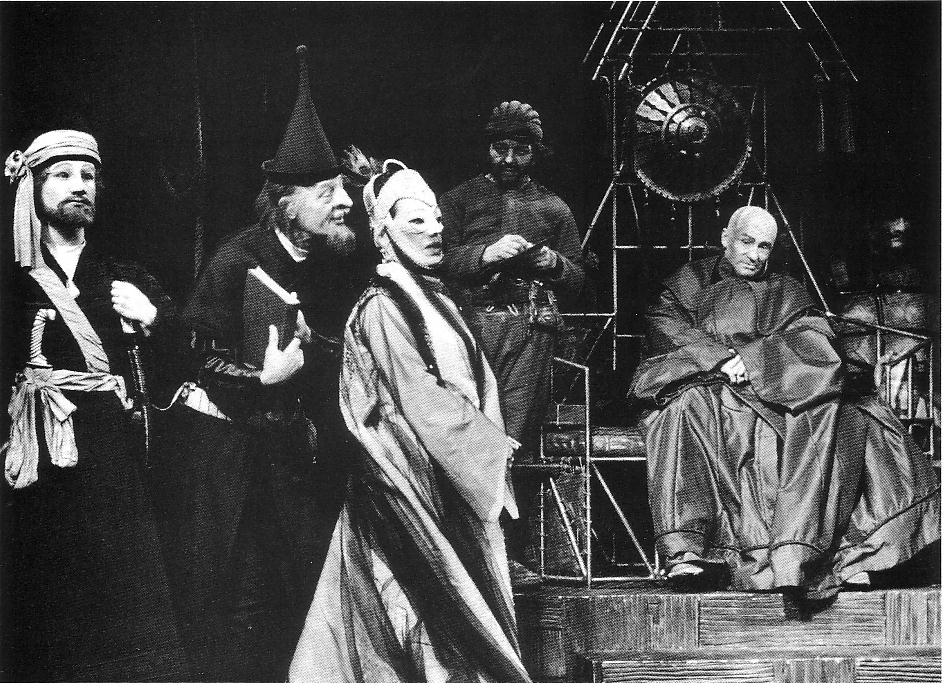 Szenenfoto der Aufführung des Kaukasischen Kreidekreises 1954 im Berliner Ensemble Das Forum für Künstlernachlässe hat den Nachlass Siewert mit allen Rechten